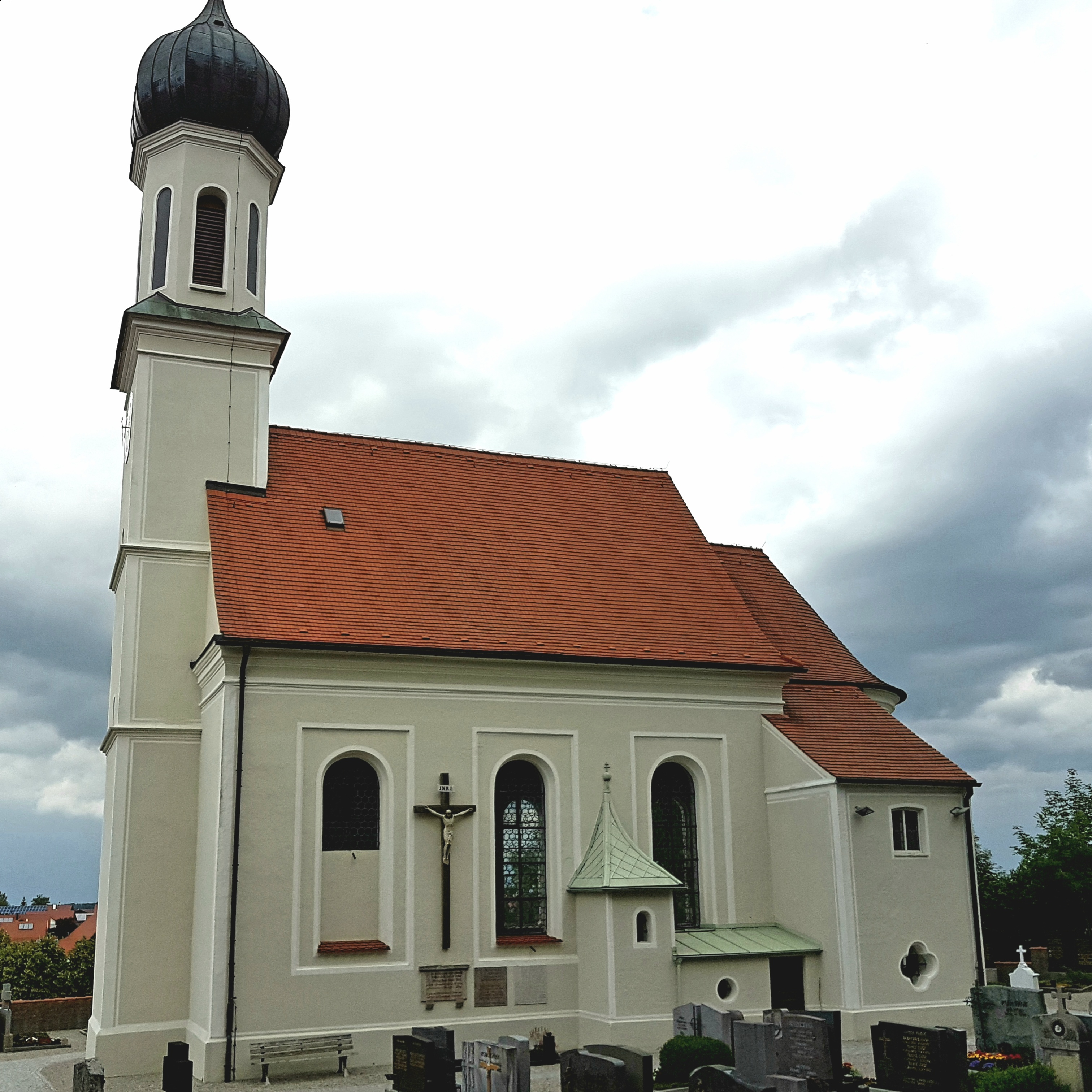 Issing (Vilgertshofen), Pfarrkirche St. Margaretha, Ansicht vom Südwesteck des Friedhofs.